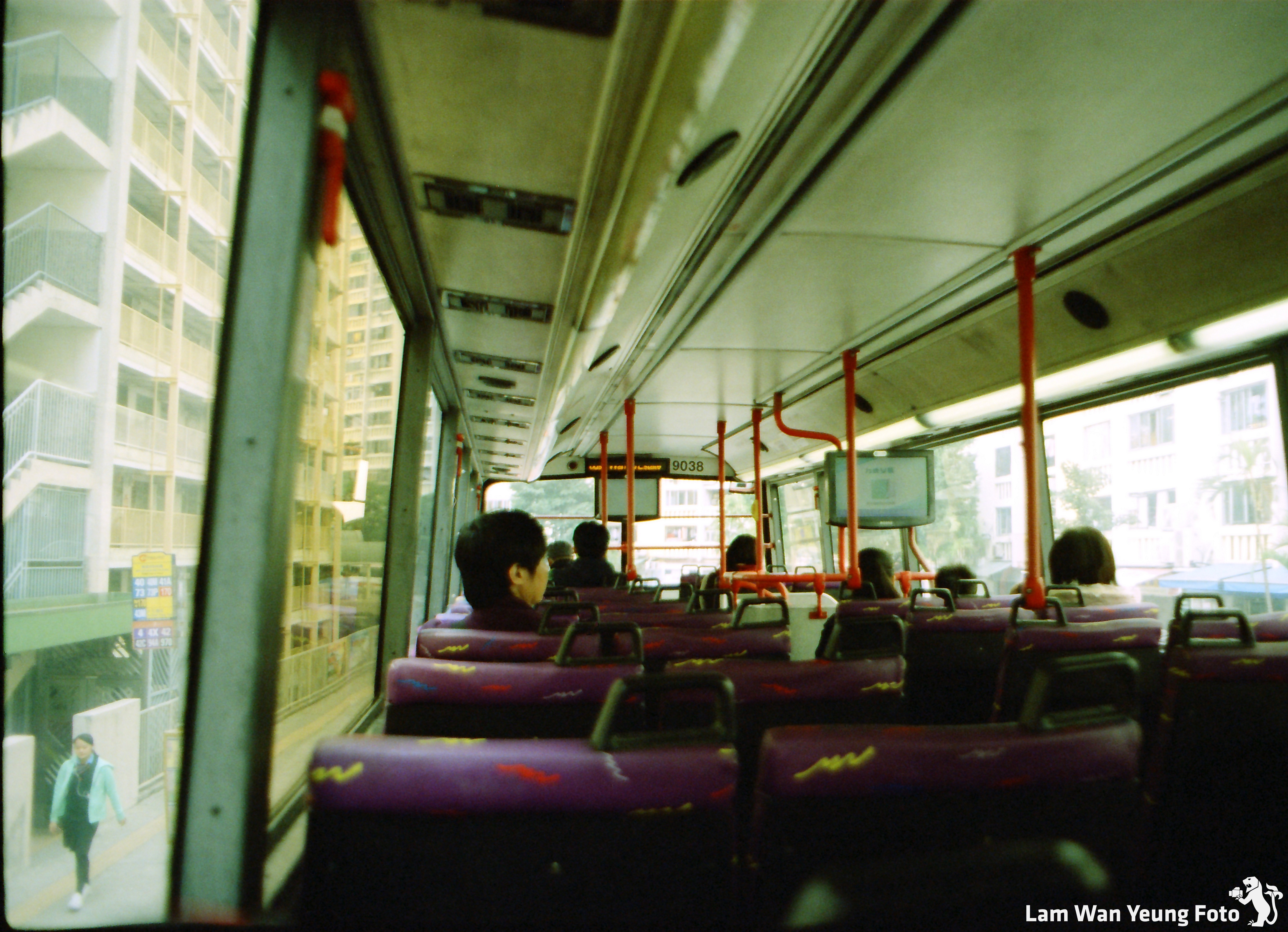 中文（香港）: 菲林：Astrum Color Negative